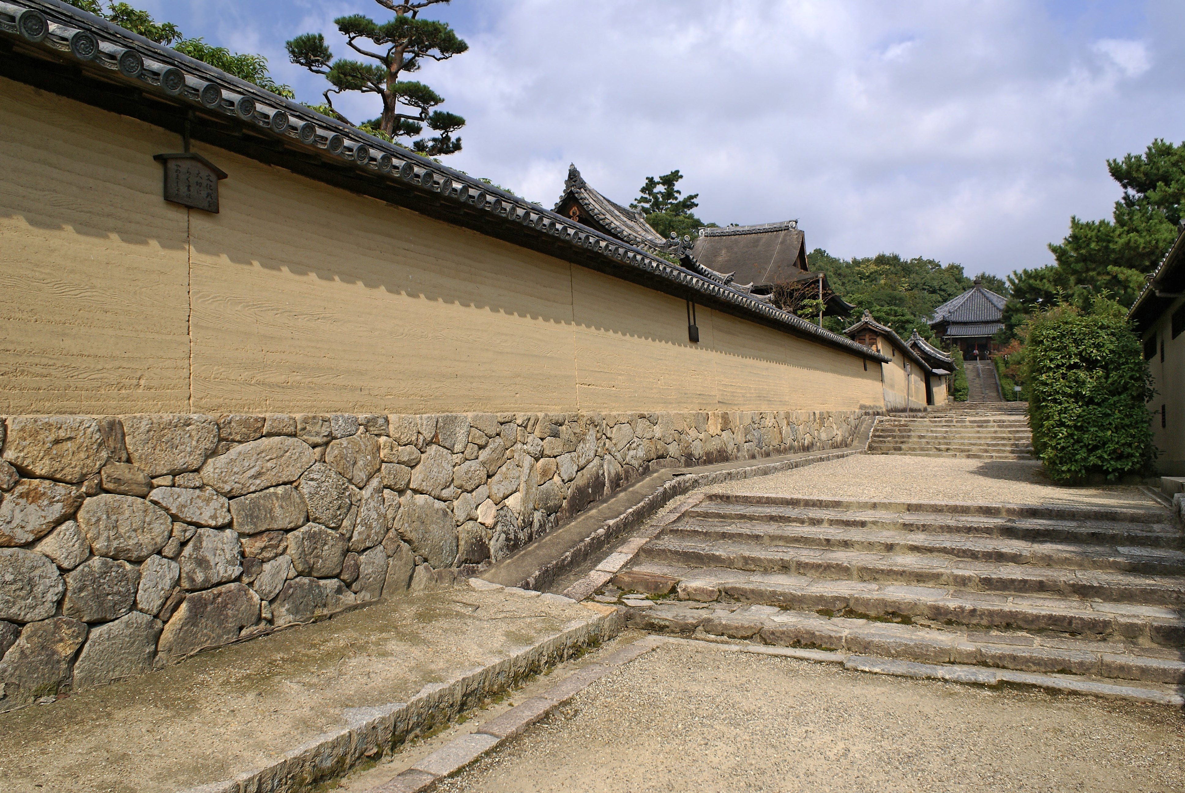 Horyu-ji in Ikaruga, Nara, Japan